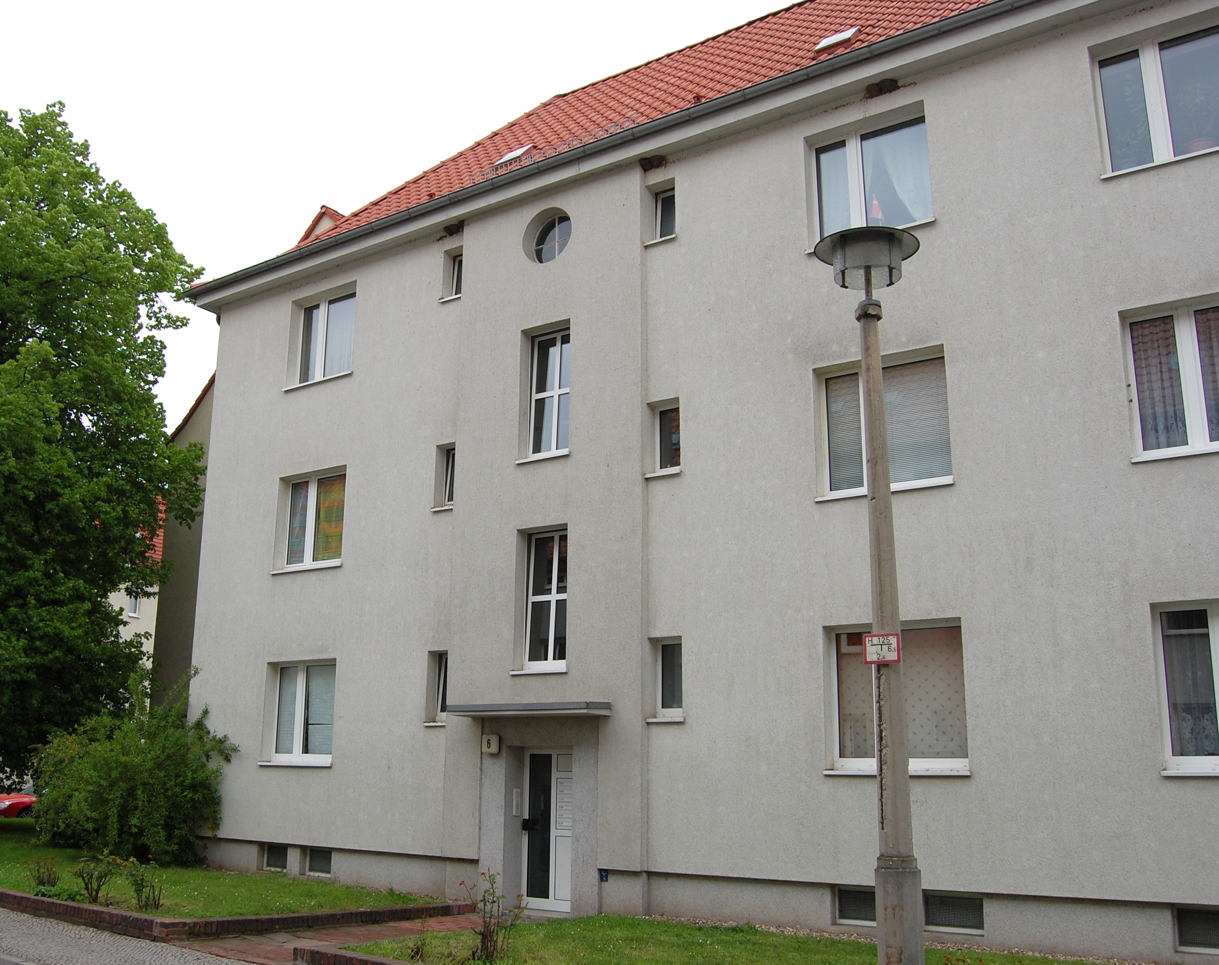 Haus Zinckestr. 6 in Magdeburg-Fermersleben